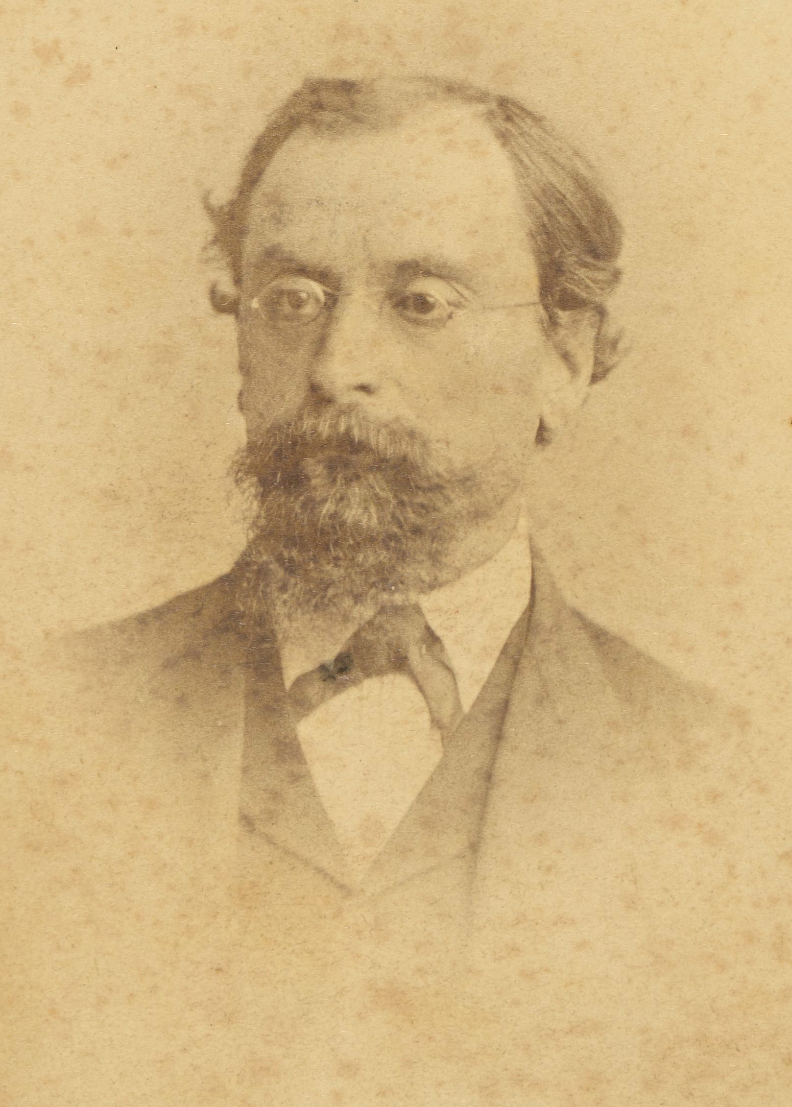 Franciszek Kopernicki, [przed 1892]